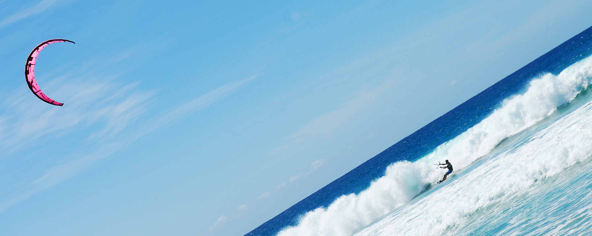 Kitesurfing in Fuertaventura